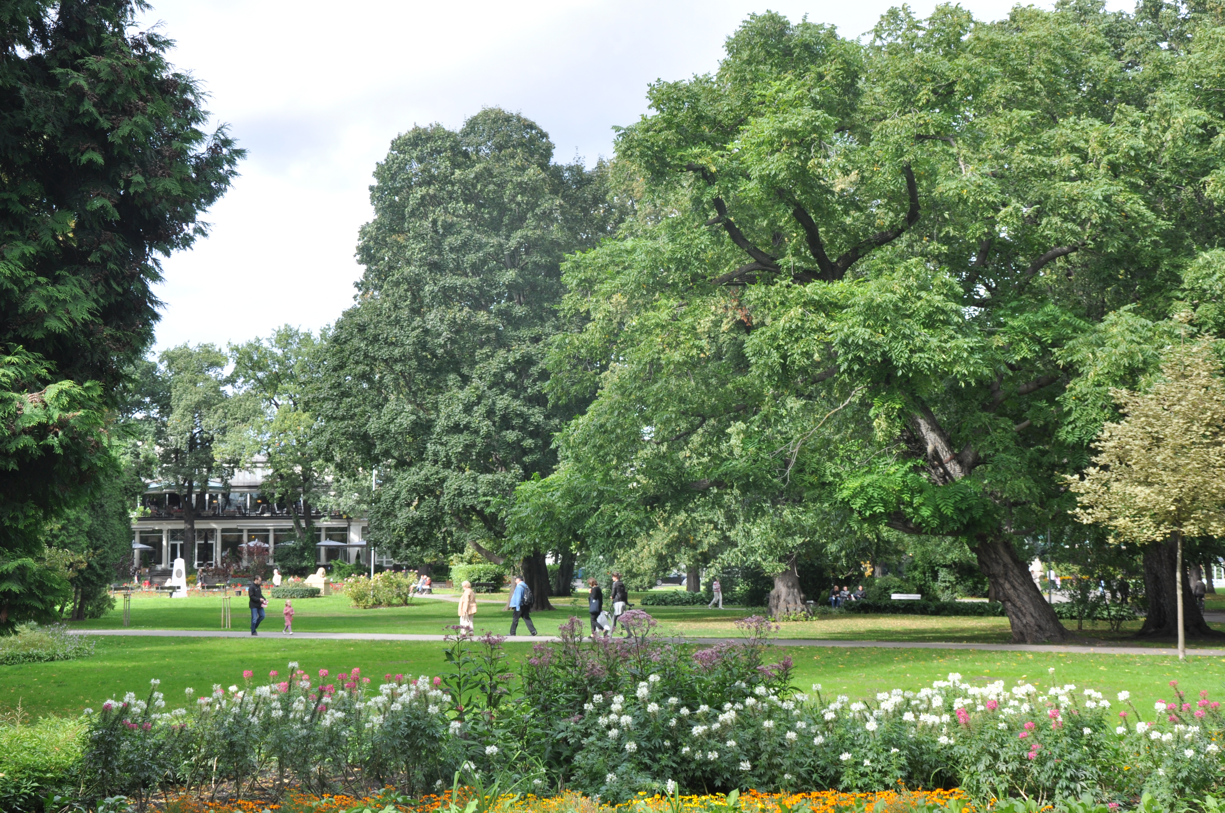 Vērmanes dārzs, Rīga, Latvia